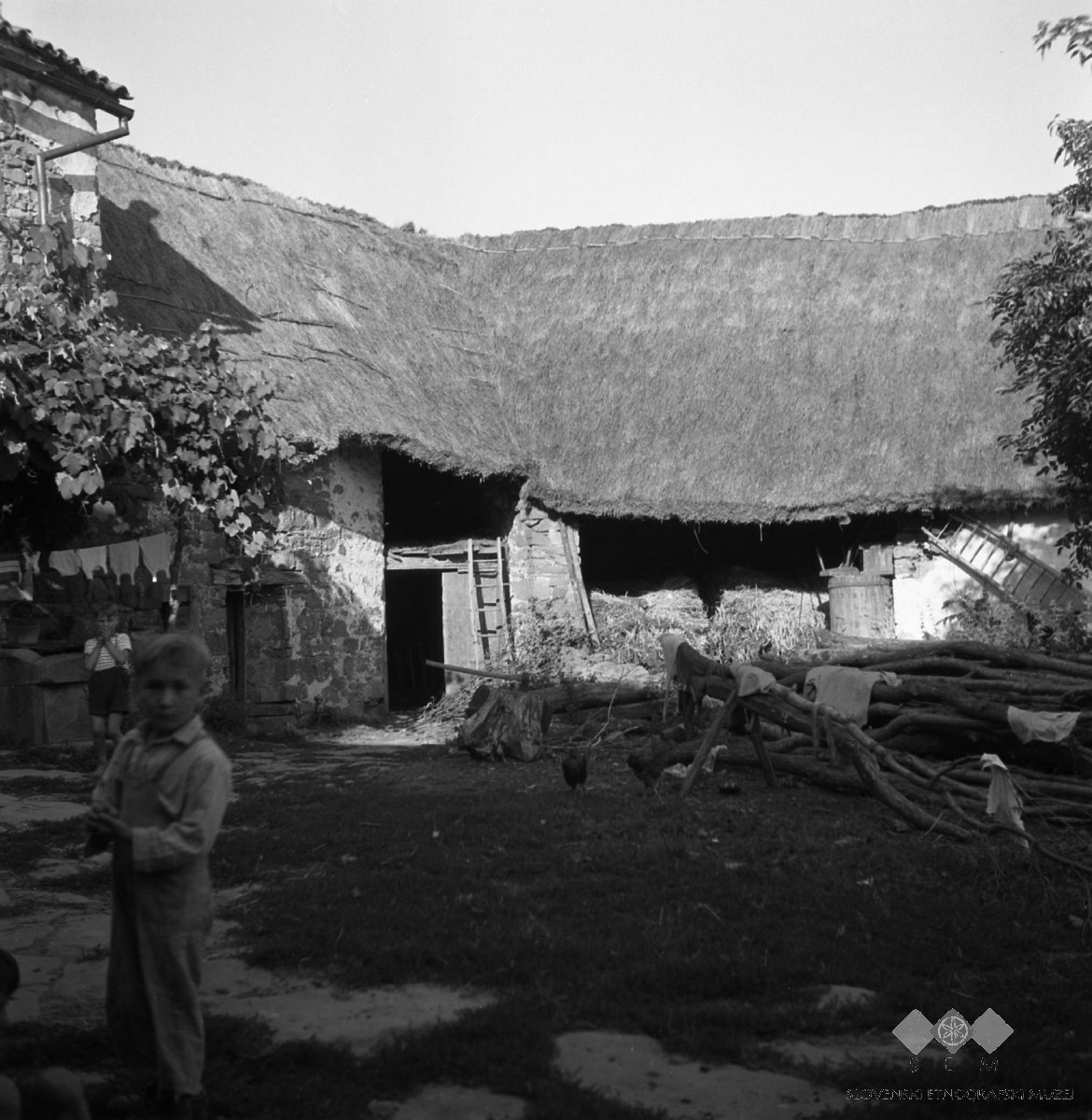 Gospodarsko poslopje, Orehek.